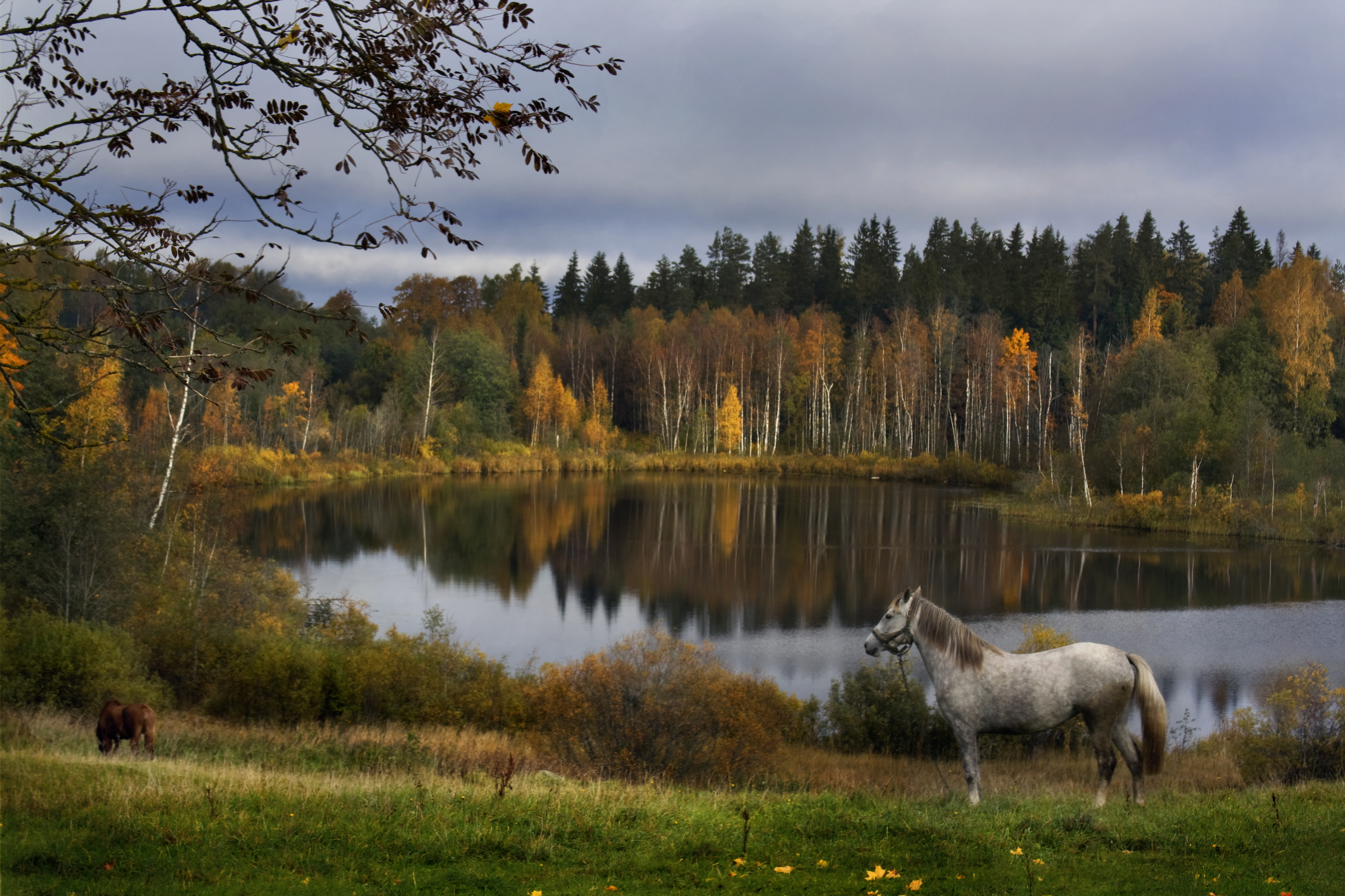 Tsilgutaja Väikejärv hobusega